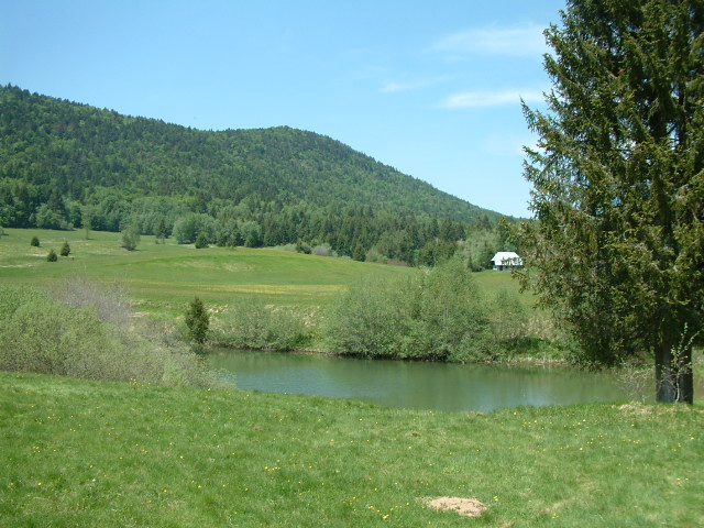 Plateau du Mariet, Arith, Bauges, France.